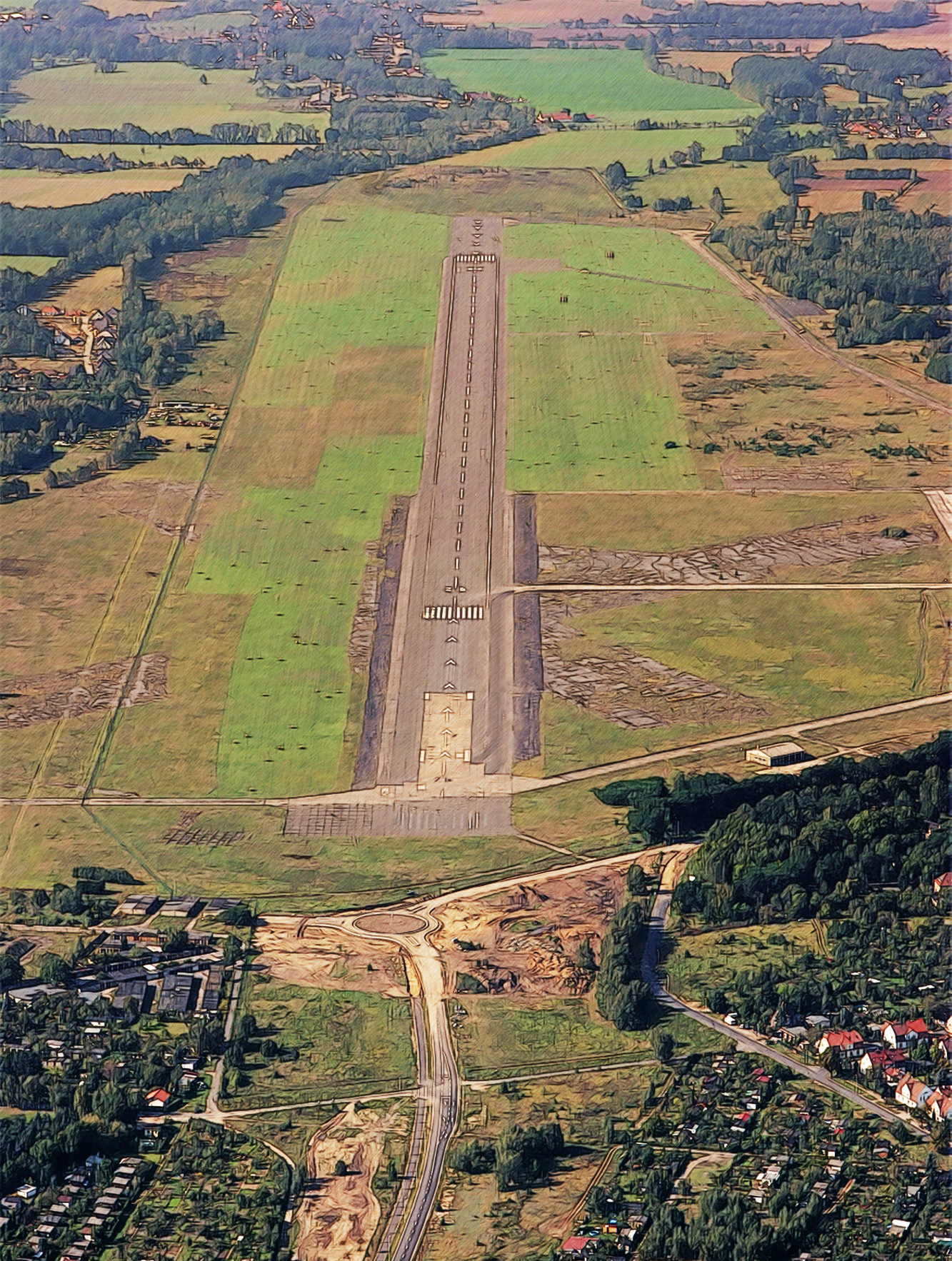 Flugplatz Cottbus von Ost nach West am 24.09.2009 (grafisch anonymisierte Luftaufnahme)